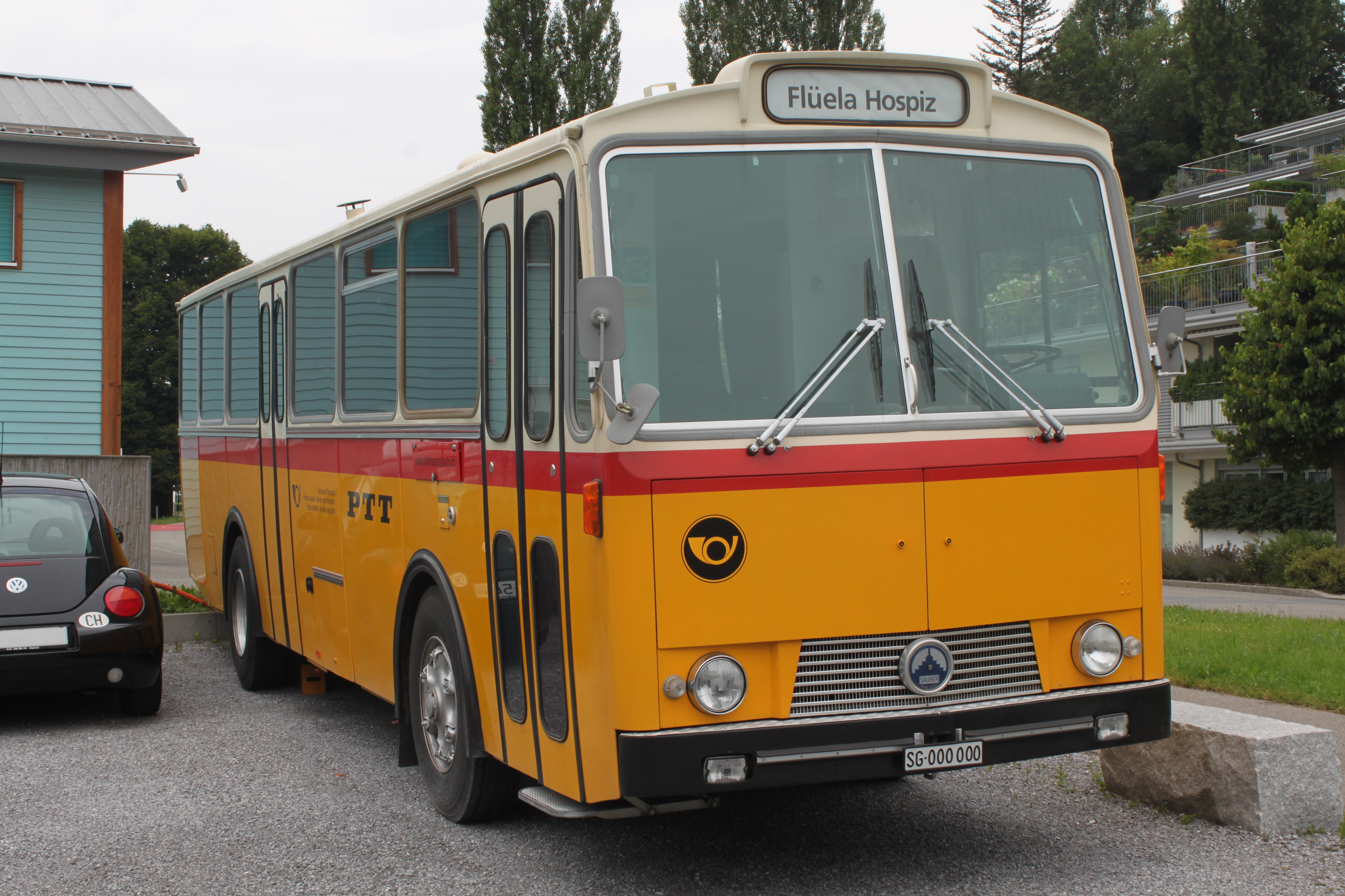 Saurer 3DUK-50 von Oldtimer- und Reisefahrten Tanner & Lambach GmbH (